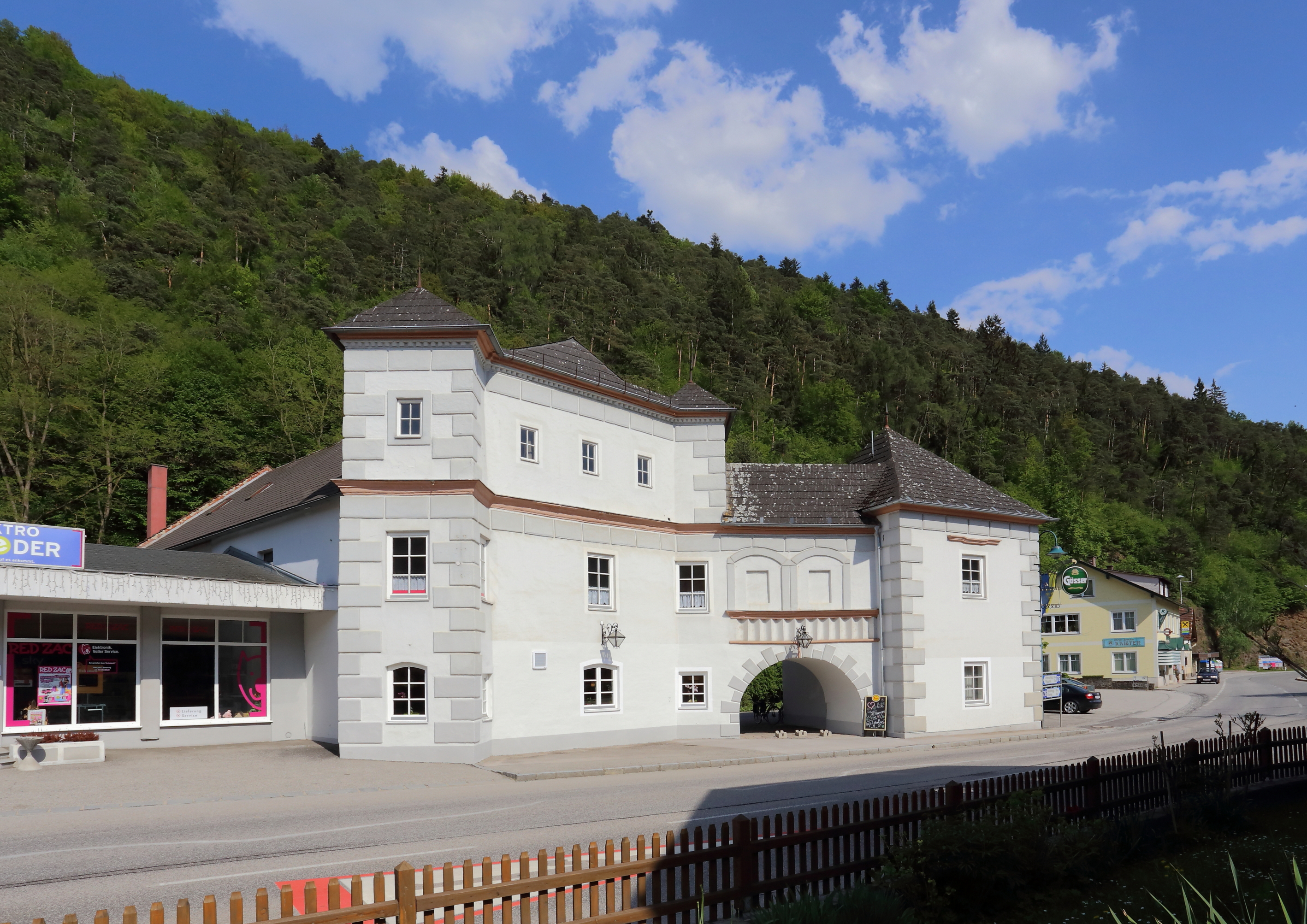 Ehemalige Mollenburg´sche Schlosstaverne in der niederösterreichischen Marktgemeinde Weiten.